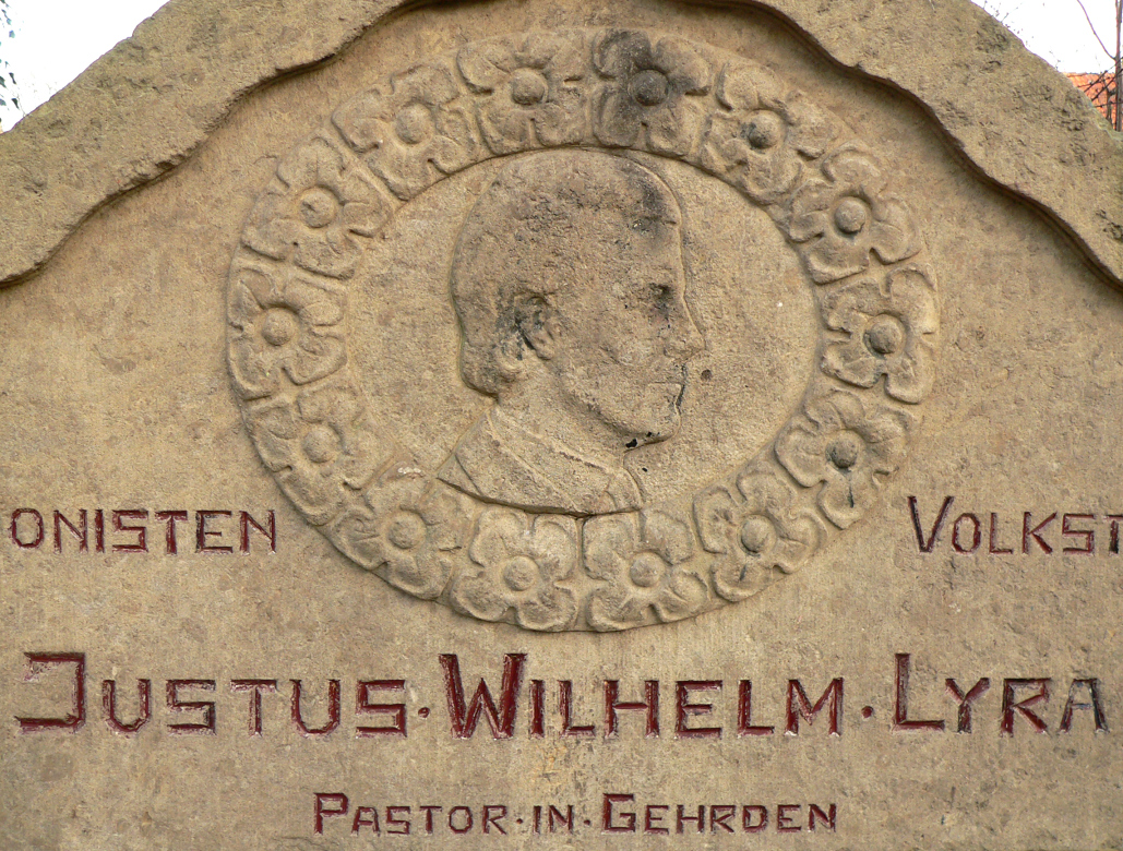 Portrait Justus Wilhelm Lyra auf Bank in Gehrden